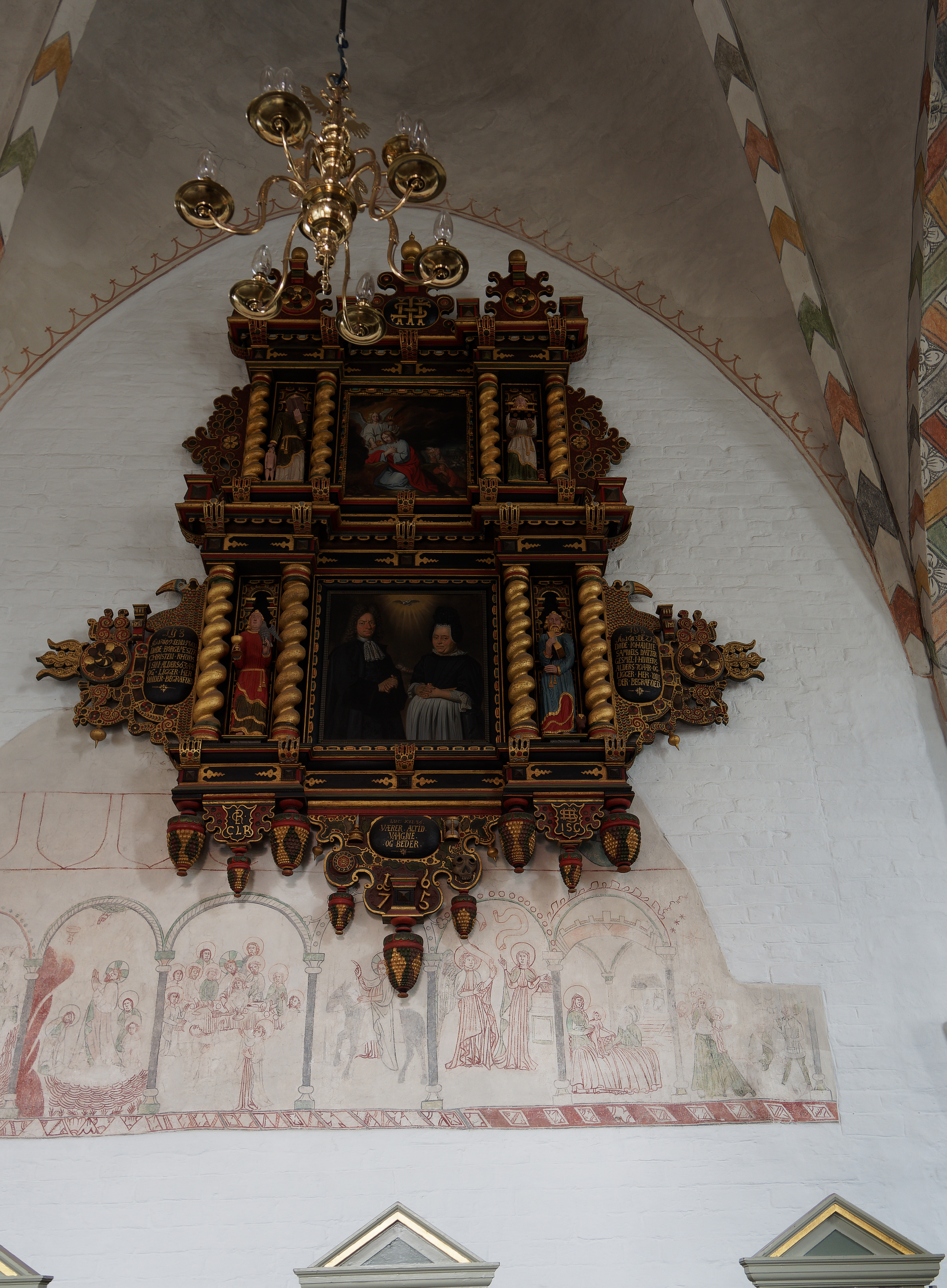 Die Marienkirche in Sæby (Frederikshavn Kommune), errichtet im 13 Jahrhundert. Frescos an der nördlichen Wand.